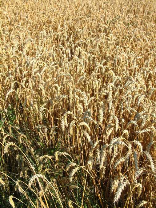 Weizenfeld, Sommer 2003 Quellenangabe und Beleg an burgkirsch(at)web.de erbeten.